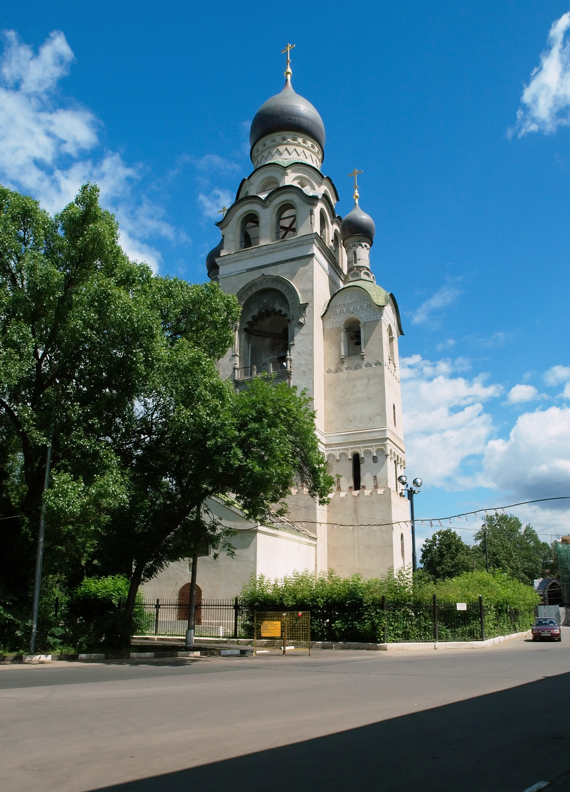 Колокольня Рогожского кладбища. Постройка 1908-1909, арх. Ф. Ф. Горностаев.